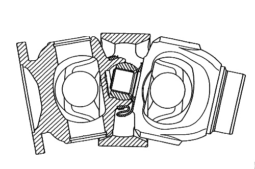 Junta Homocinética de Cardan Doble